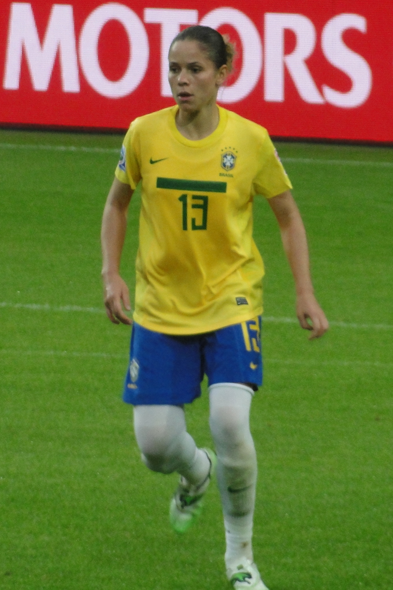 Érika Cristiano dos Santos - Match de phase de groupes de la coupe du monde entre le Brésil et la Norvège le 3 juillet 2011 à Wolfsbourg